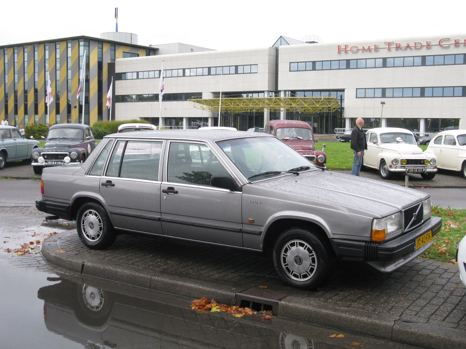 Volvo Klassiekers Beurs, Utrecht